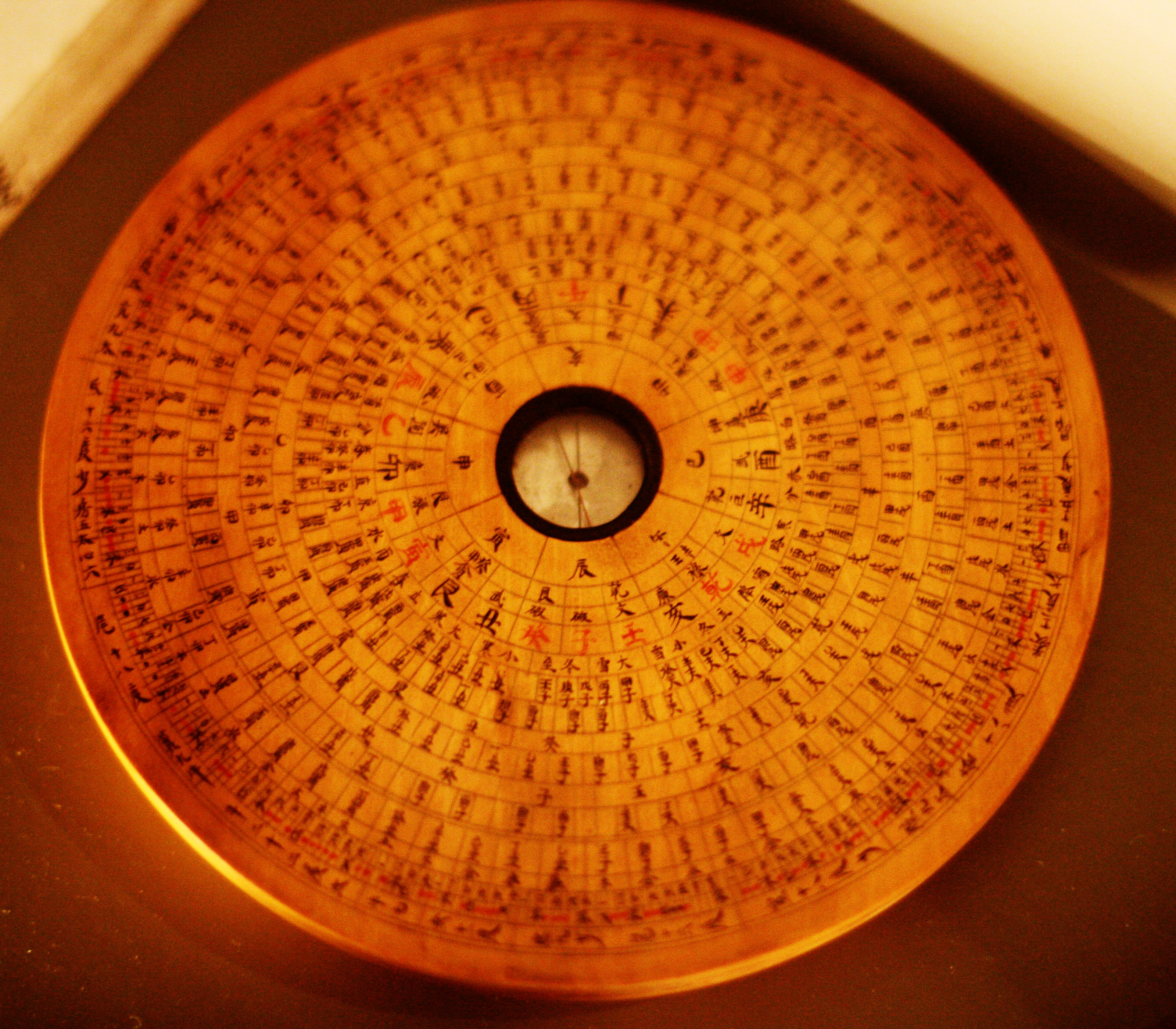 Chinesischer Kompass im Überseemuseum Bremen